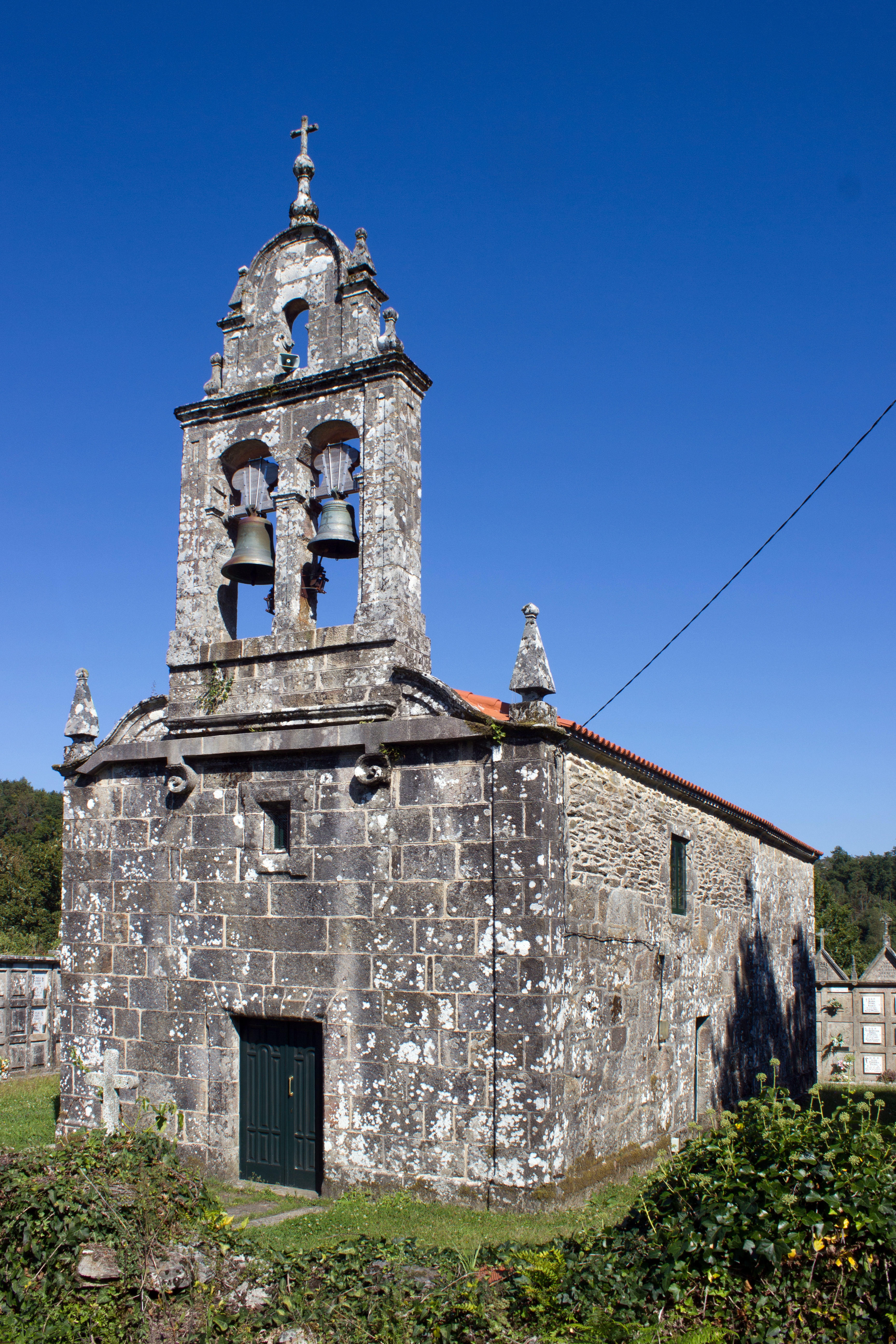 Igrexa de San Pedro de Quintillán, no concello de Forcarei.